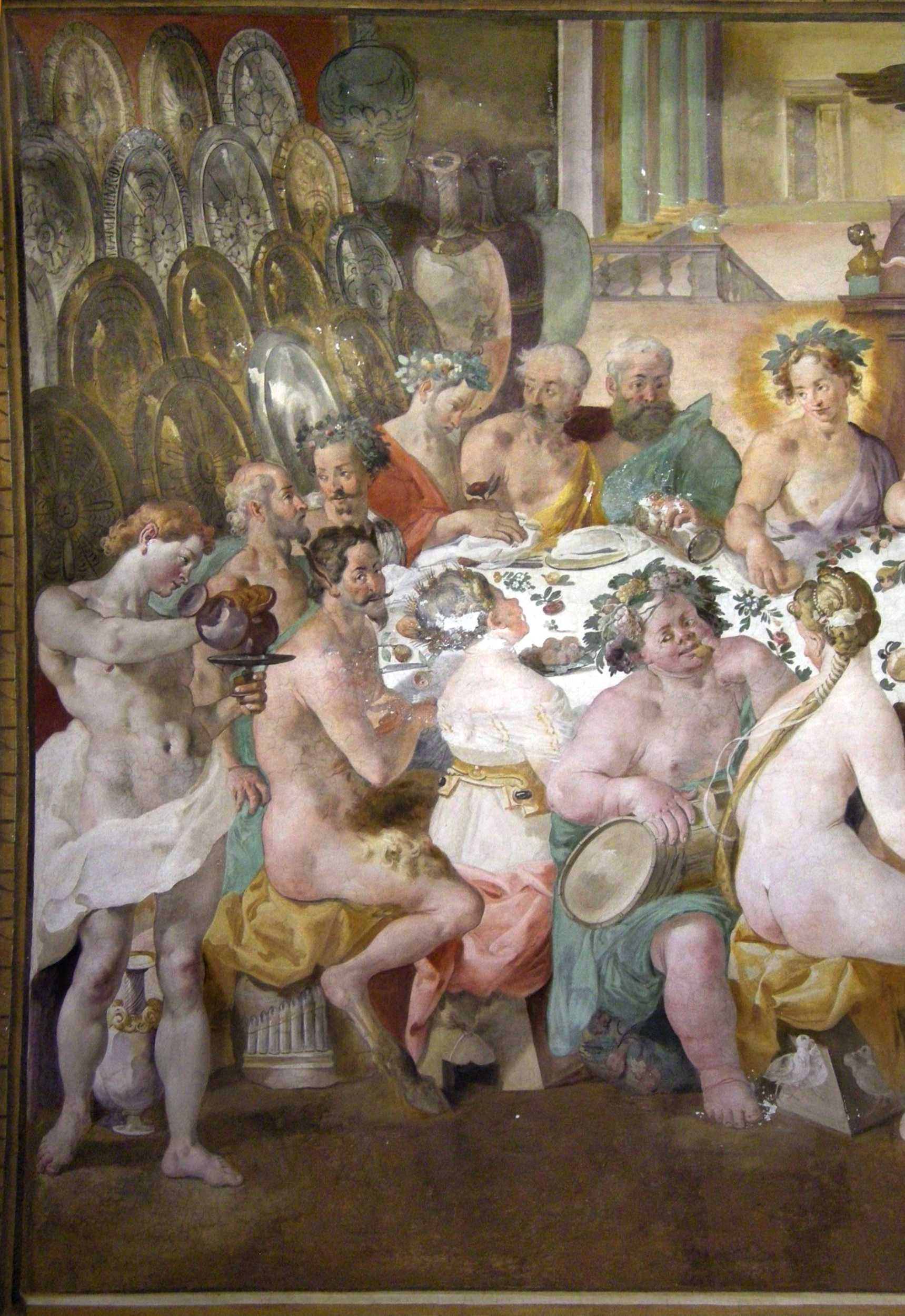 Villa di corliano, interno, salone affrescato da andrea boscoli, 10.1